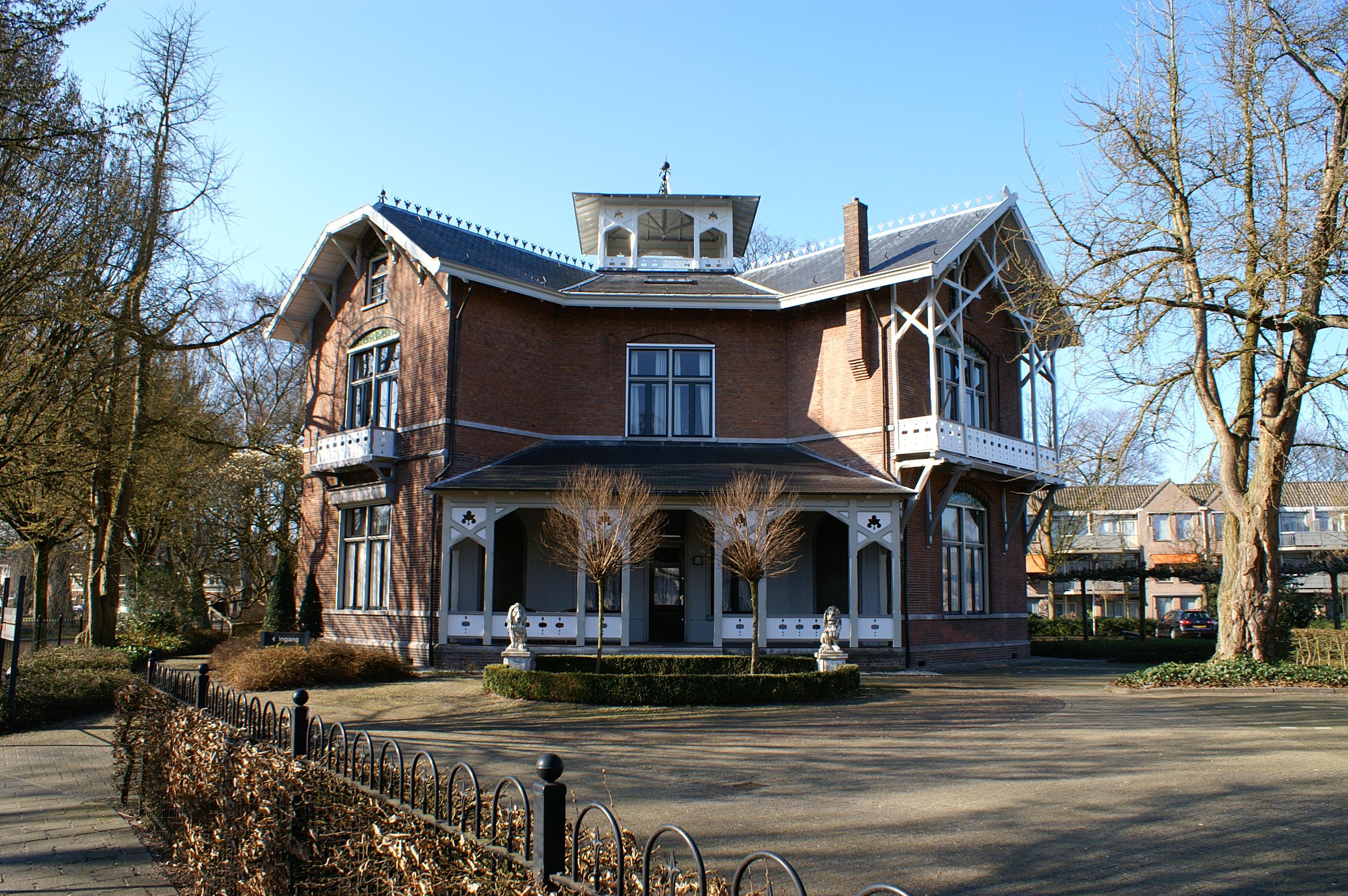 Voormalig kasteel Leeuwenburg te Vught.